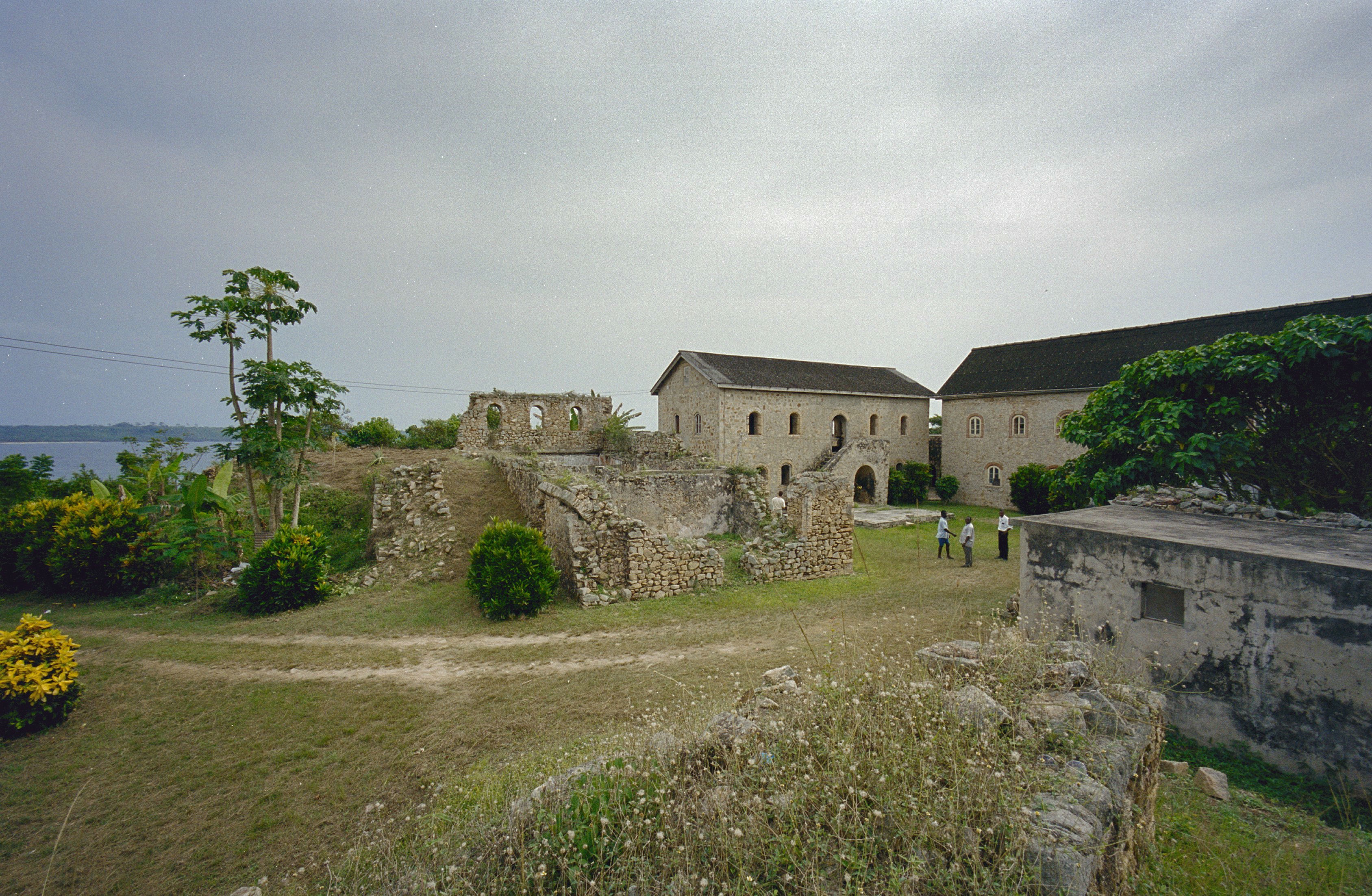 Fort Gross-Friedrichsburg: Overzicht met ruïne, linker zijvleugel en gedeelte voorgevel (opmerking: Ghana reis Loek Tangel)